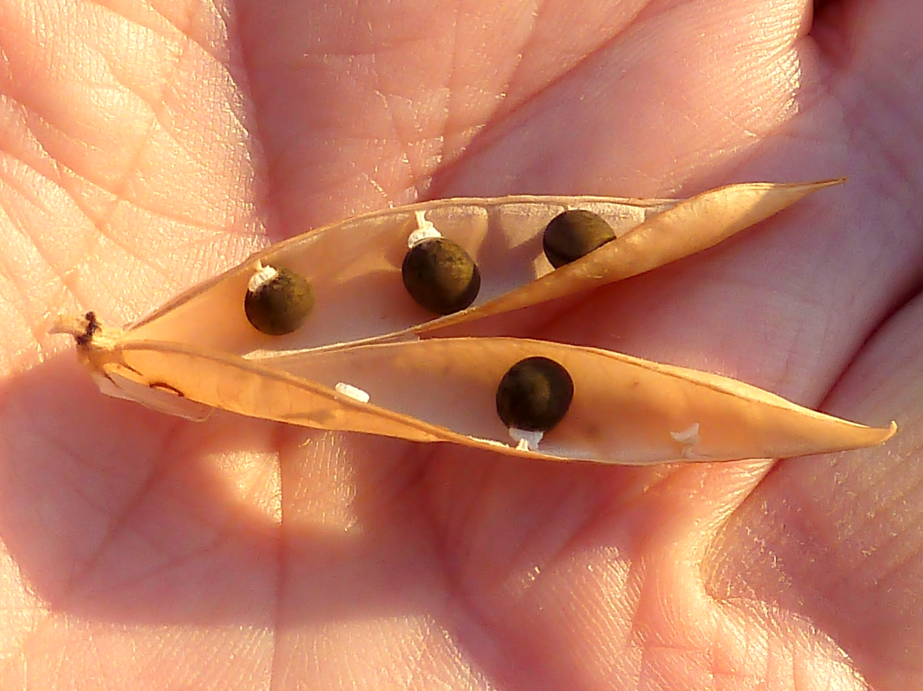 Vicia monantha (Algarroba) - Fruto maduro abierto con sus semillas in situ. - Camino del Canalillo, Albatera (Provincia de Alicante, España).